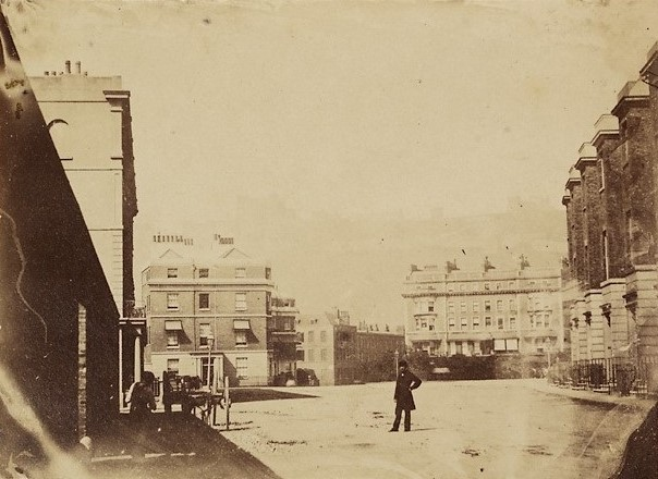 Teitl Cymraeg/Welsh title: Golygfa stryd, Dofr Dyddiad/Date: c.1860 Cyfeiriad/Reference: crj00009 (PG2064/3) Rhif cofnod / Record no.: 3590900 Rhagor o wybodaeth am Ffotograffiaeth Gynnar Abertawe yn Llyfrgell Genedlaethol Cymru More information about Early Swansea Photography at the National Library of Wales